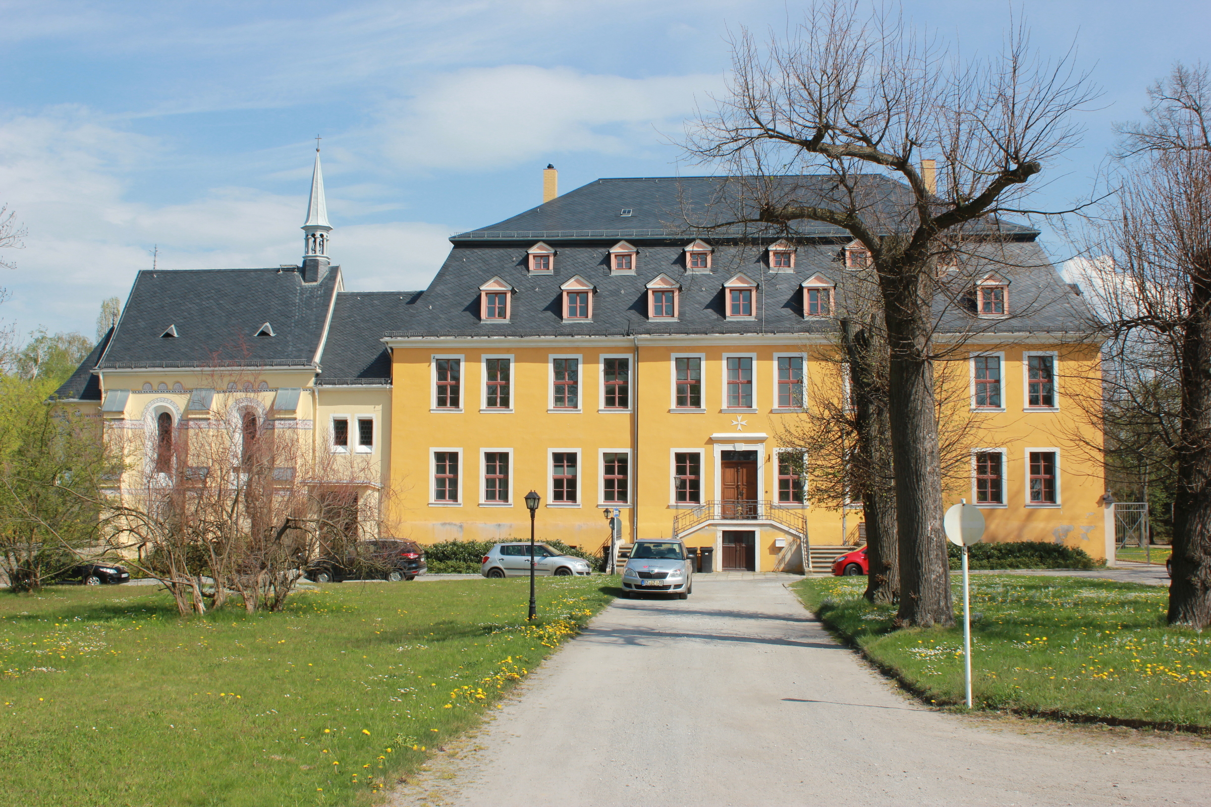 Hornjoserbsce: Hród we Worklecach.